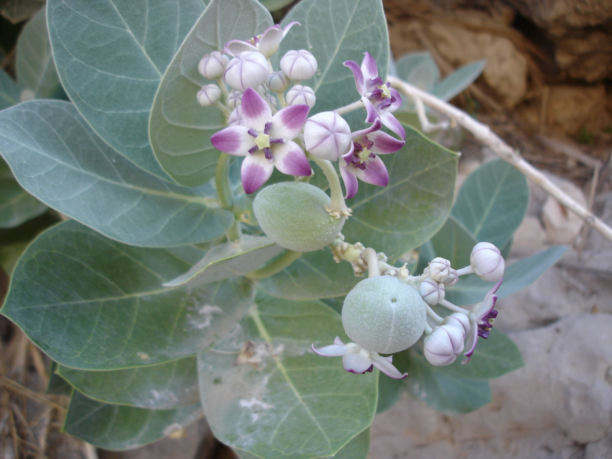 Calotropis procera, inflorescence, Muscat, Oman